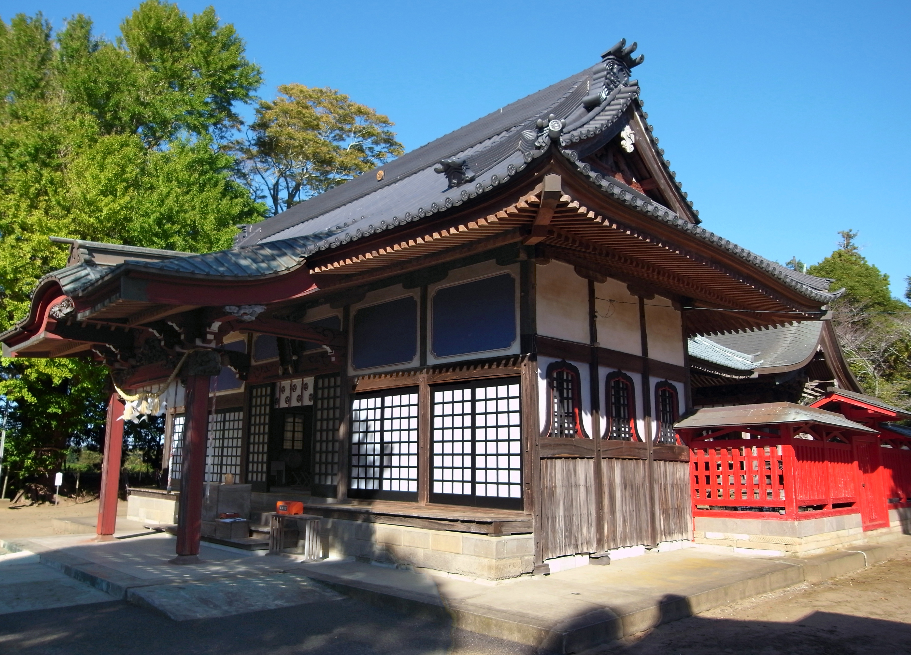 白子神社 拝殿